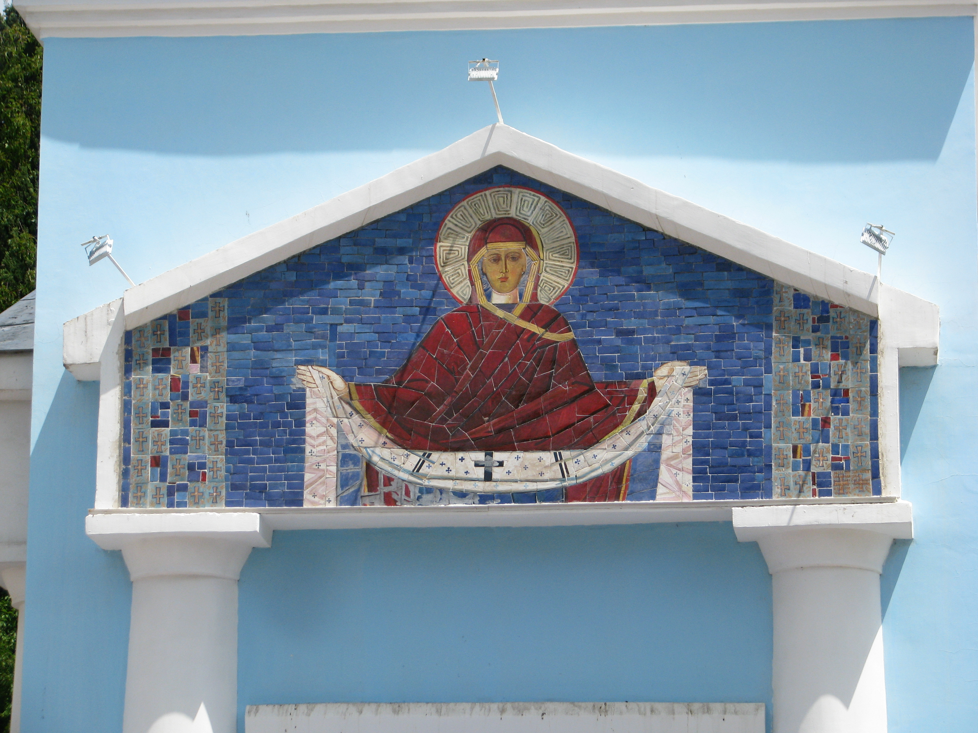 Мозаика на фасаде Свято-Покровского храма (Судак).jpg